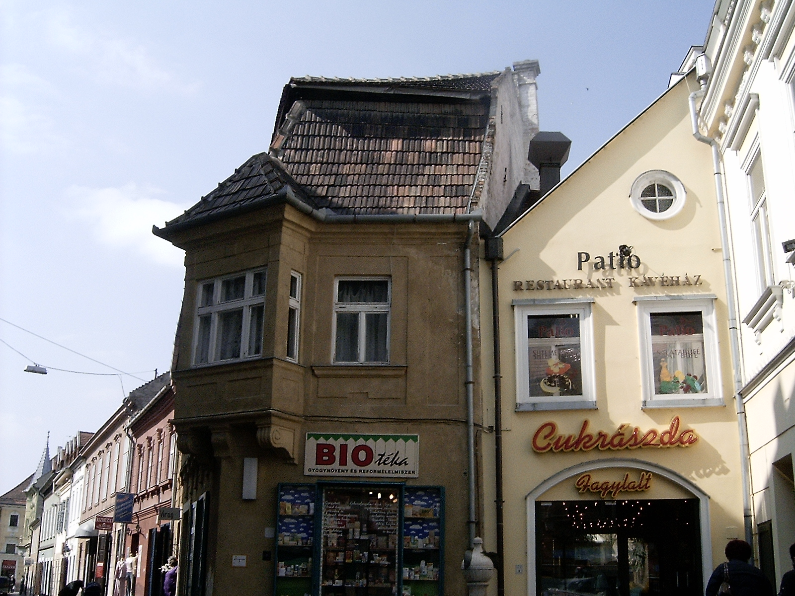 Sarokerkély Győrött a Kisfaludy utcában